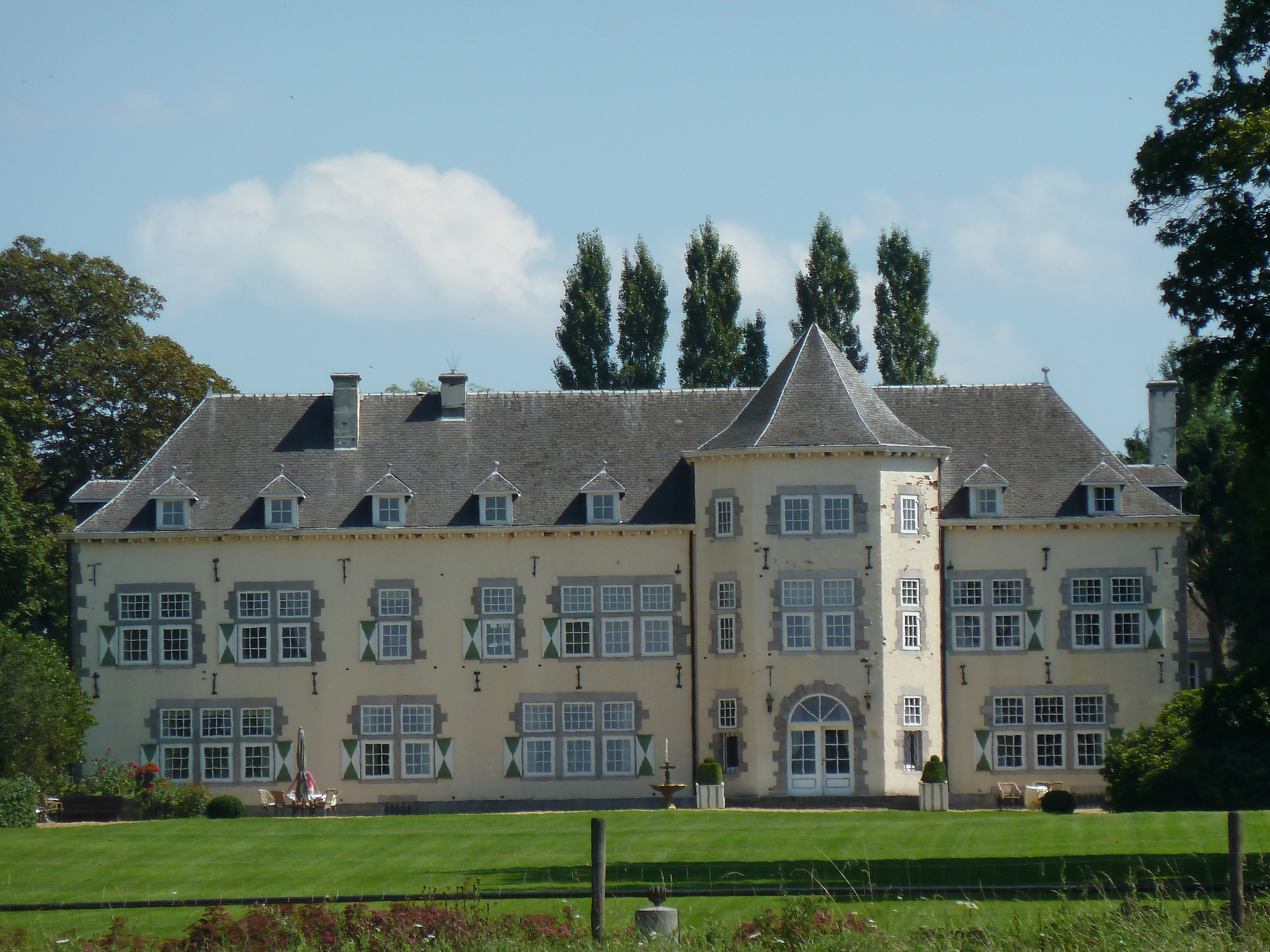 Château de Forêt, Forêt, Trooz, Belgique, Forêt, Trooz, Belgique